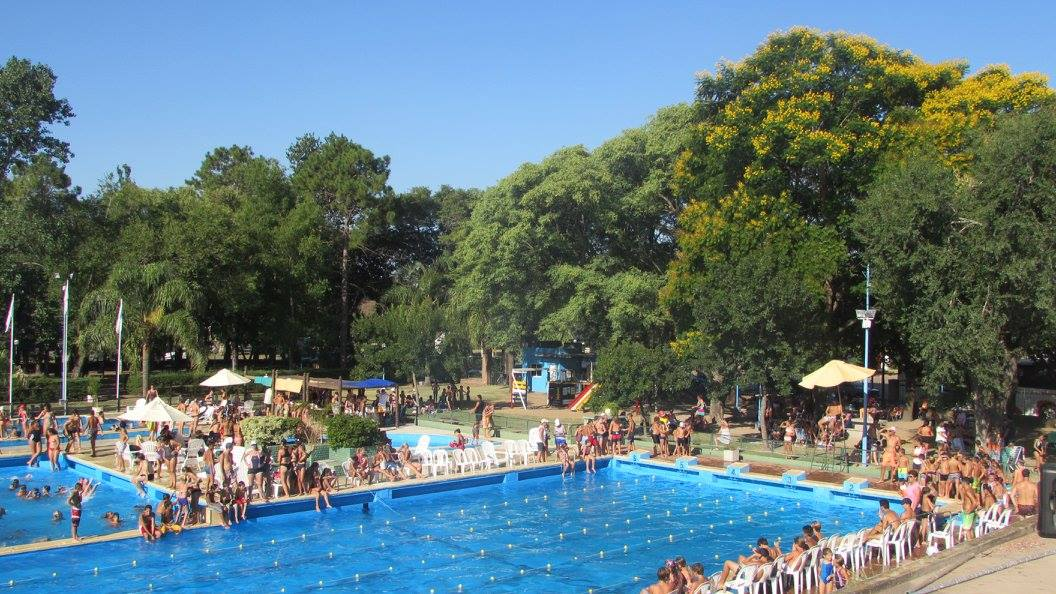 Natatorio - Argentino de San Carlos